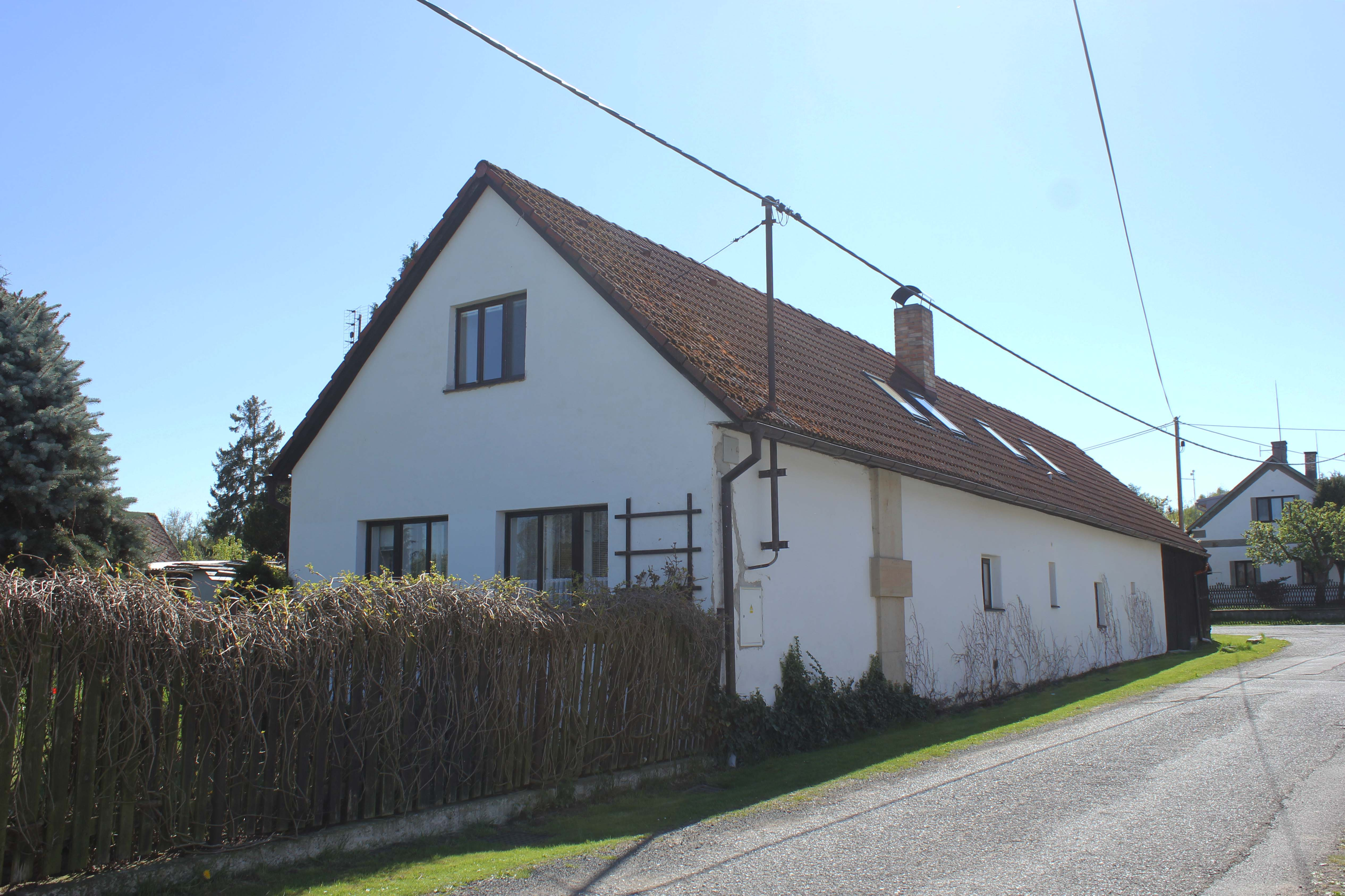 Dům Habadových, Bezděkov pod Třemšínem